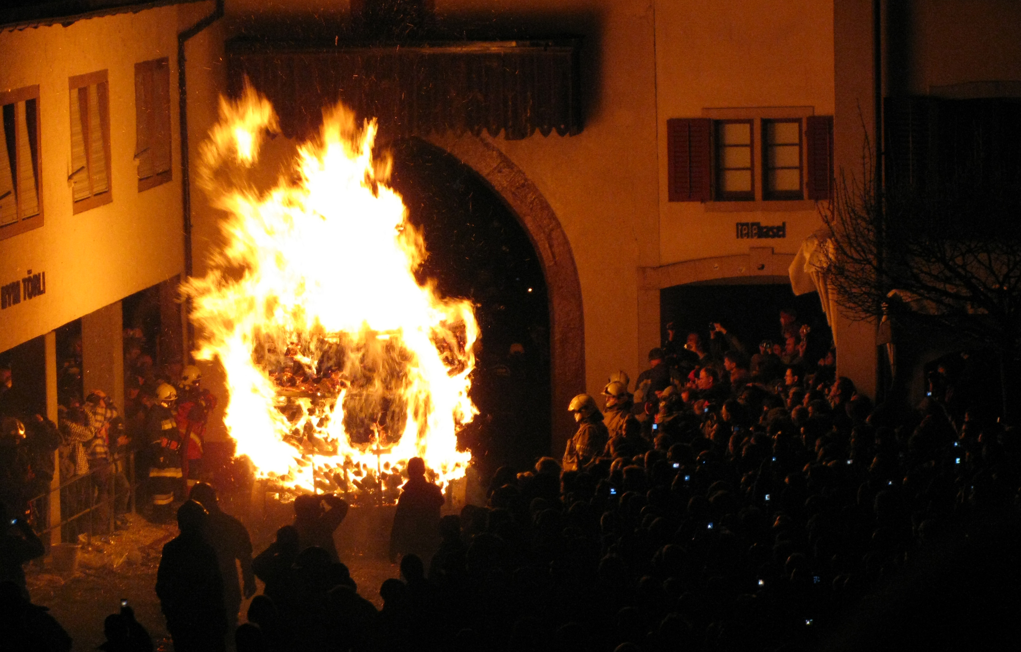 Chienbäse at Burgstrasse/Obertor in Liestal 2009